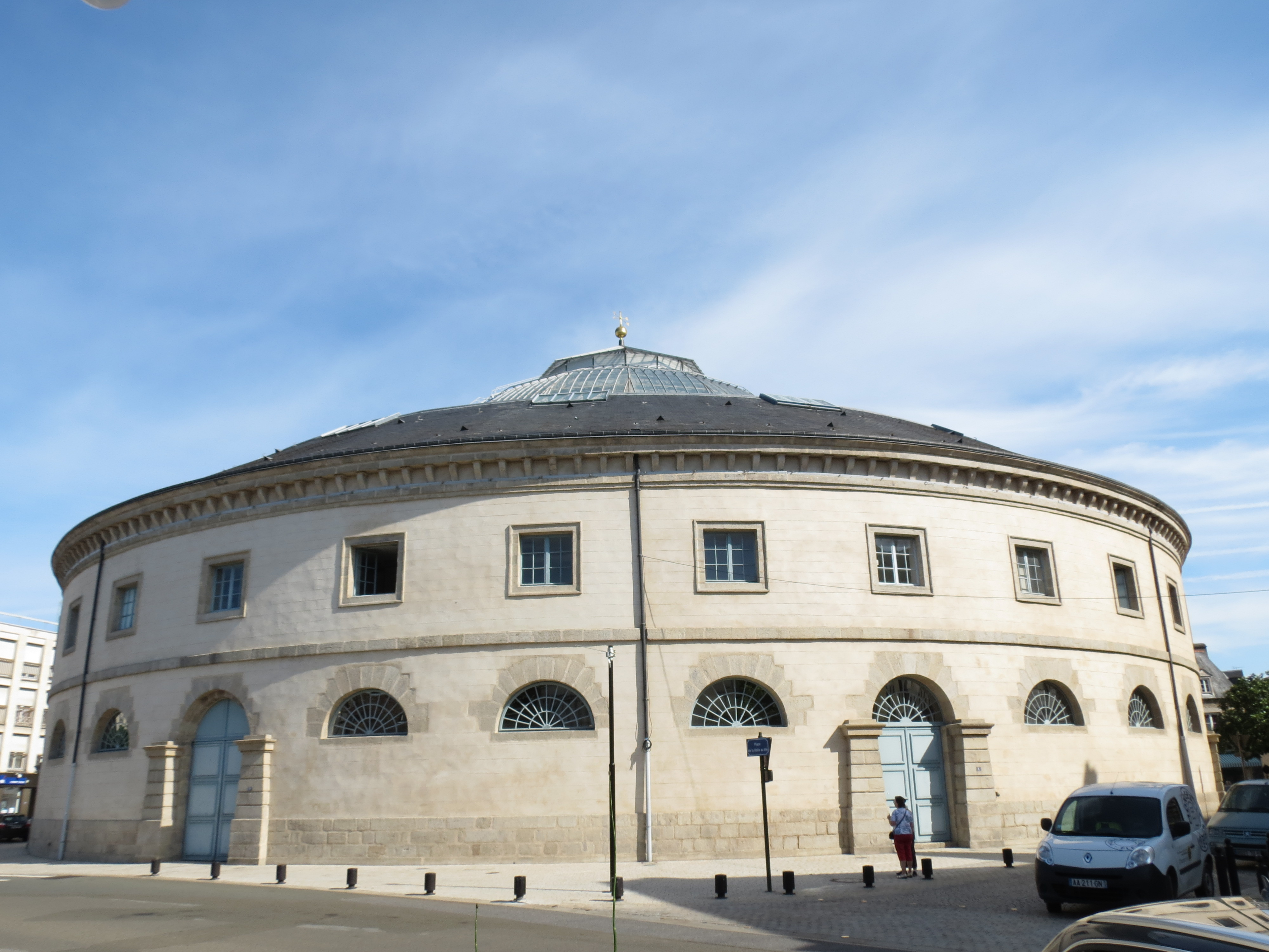 Halle au blé, Alençon, Orne, Normandie.